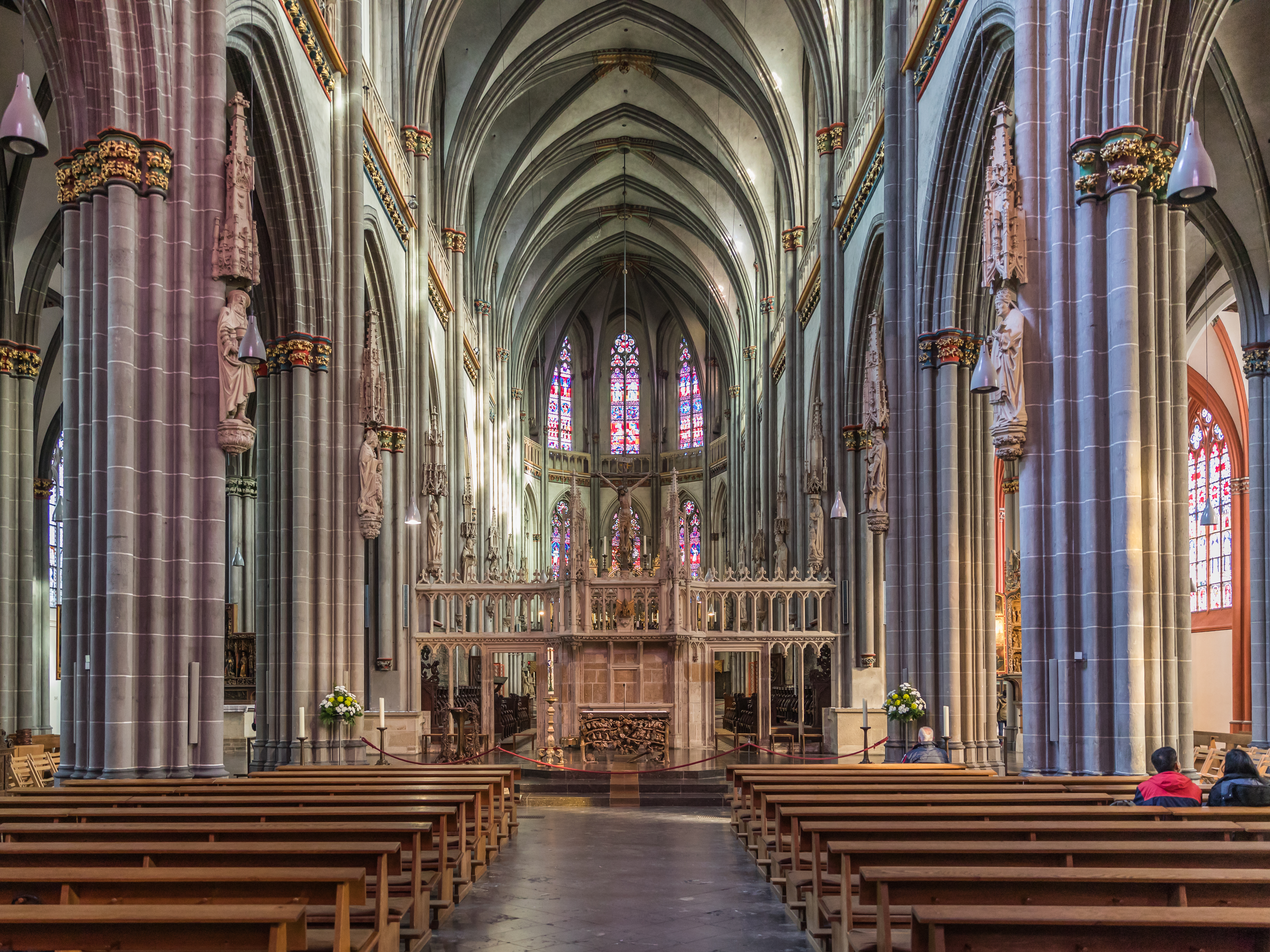 Xantener Dom, Hauptschiff Richtung Chor